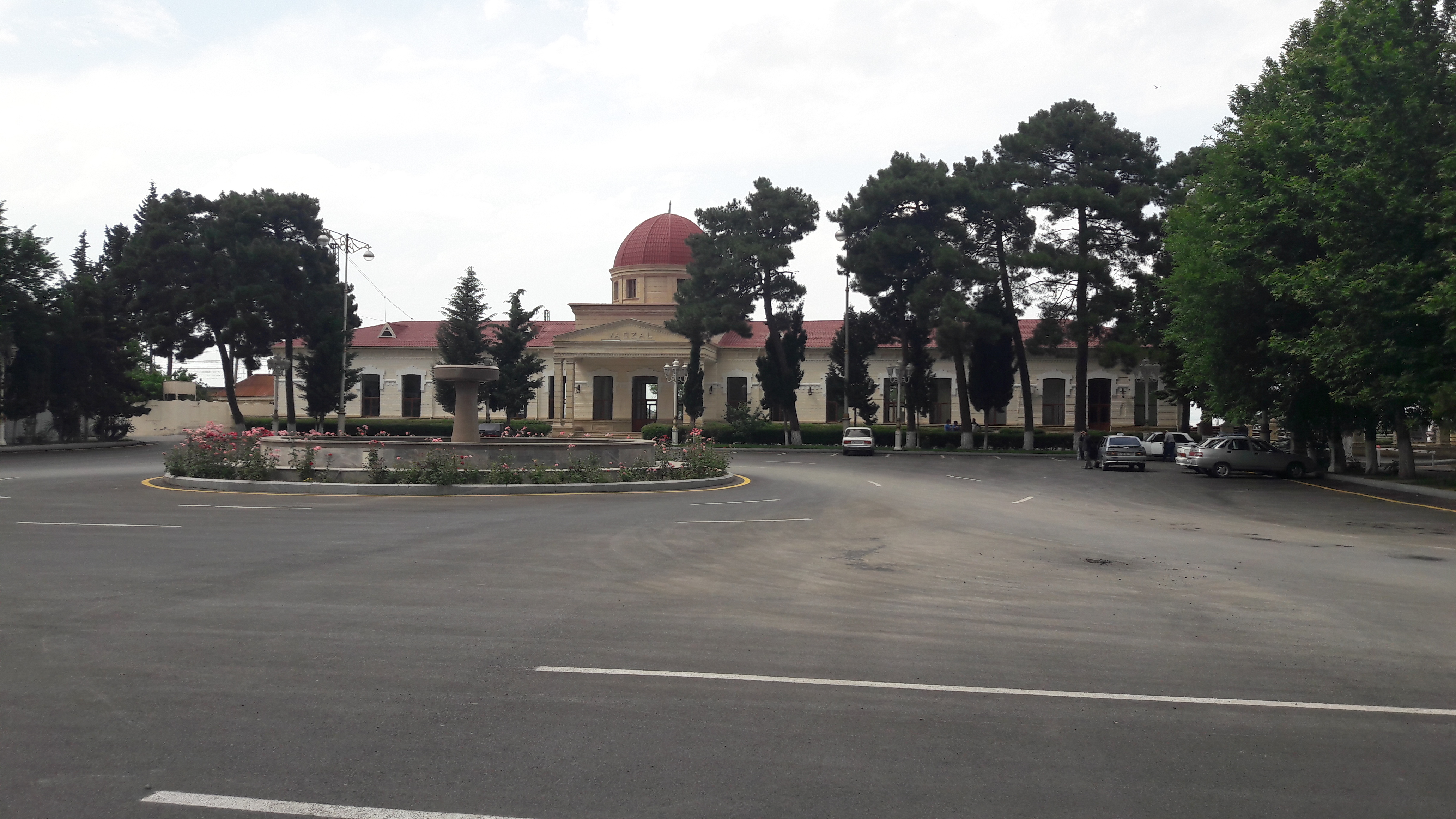 Yevlax Dəmiryol Stansiyası 2017.05.27